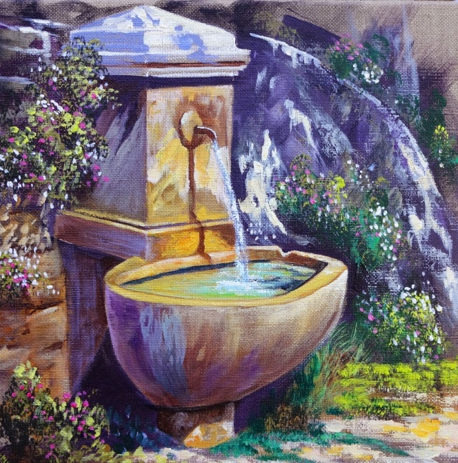 fontaine de la Placette (1830) à Tourtour